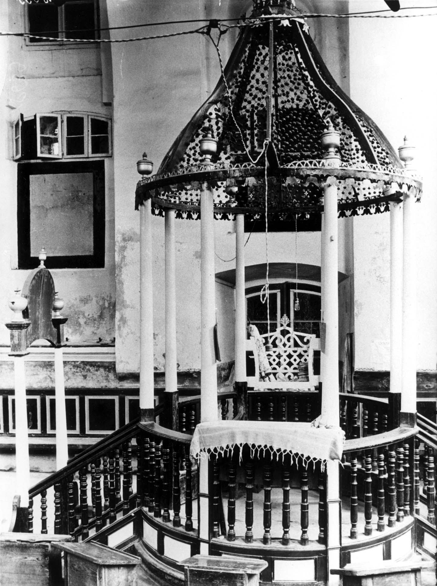 Беларуская (тарашкевіца): Нясьвіж (Niaśviž), прадмесьце Казімер (Kazimier). Халодная сынагога